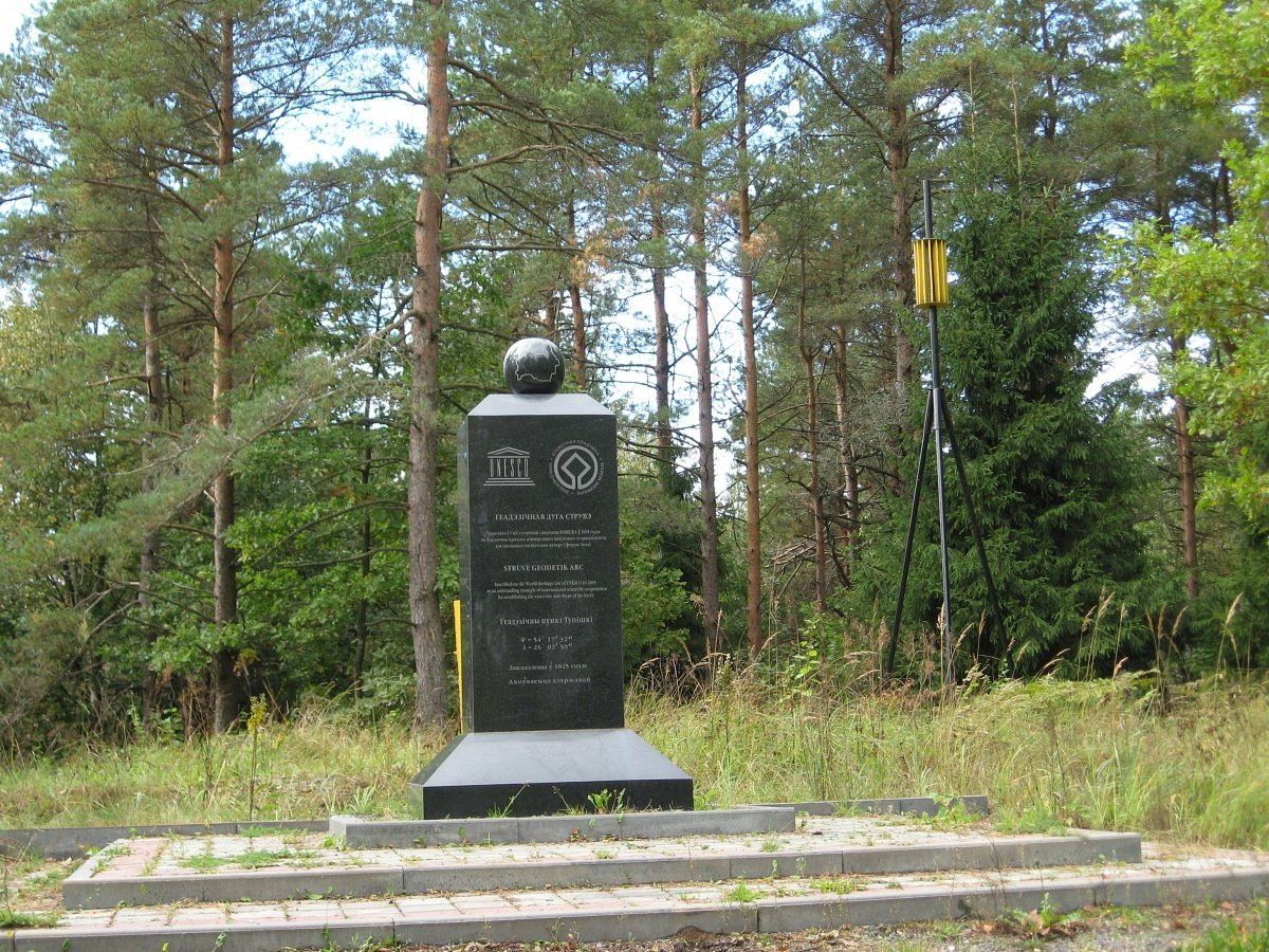 Дуга Струвэ. Тупішкі